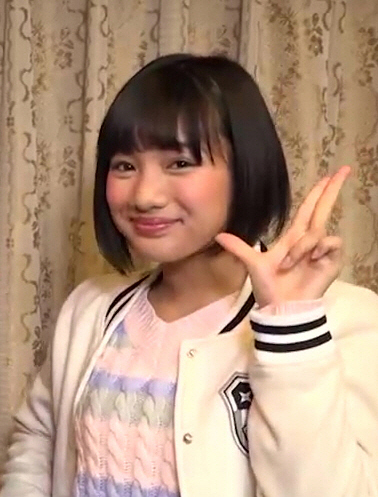 【公式】『帰ってきた手裏剣戦隊ニンニンジャー ニンニンガールズVSボーイズ FINAL WARS』特別映像！